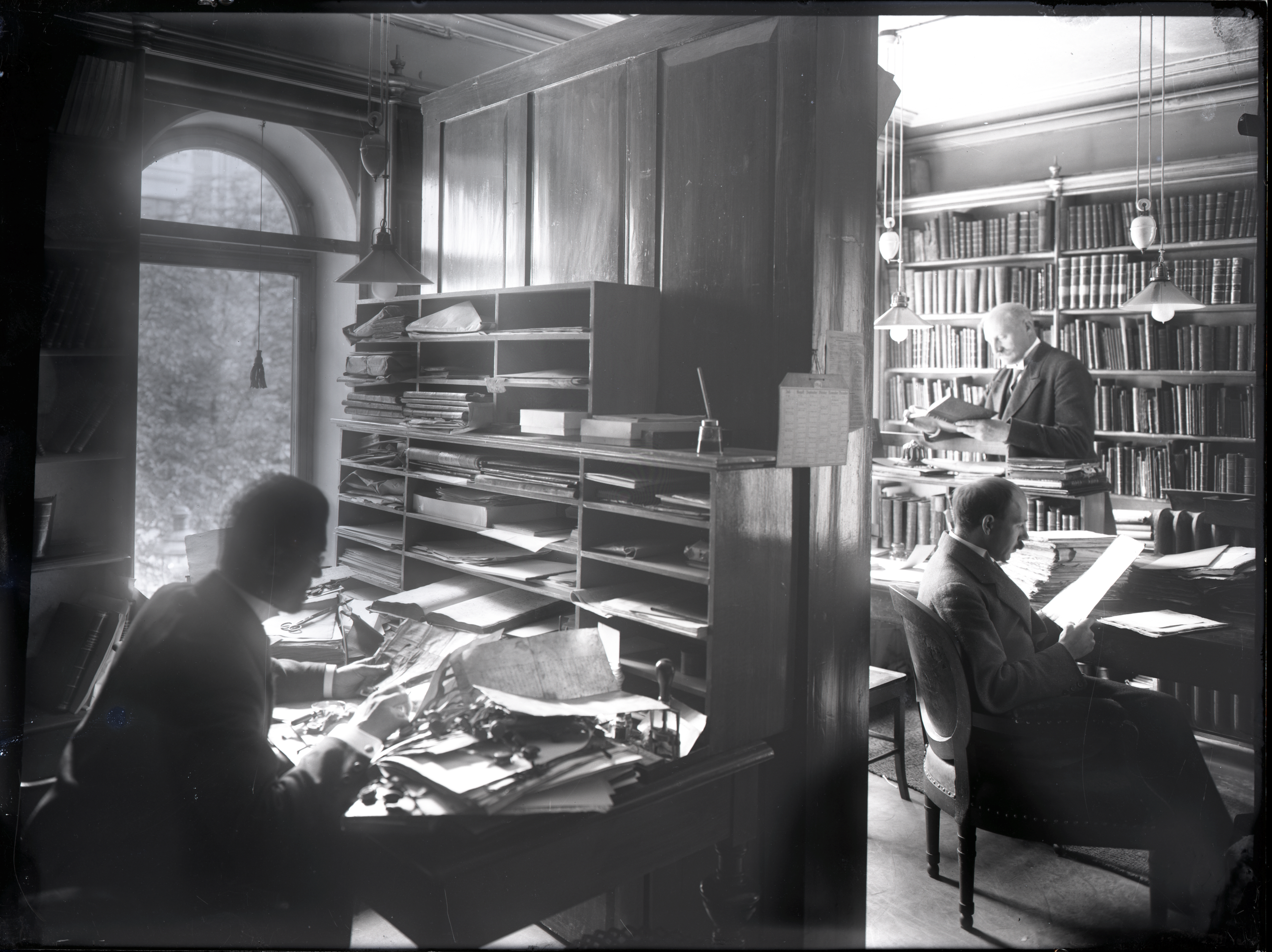 Arkivar Chr. Brinchmanns kontor. Brinchmann, Friis og Mosgreen.